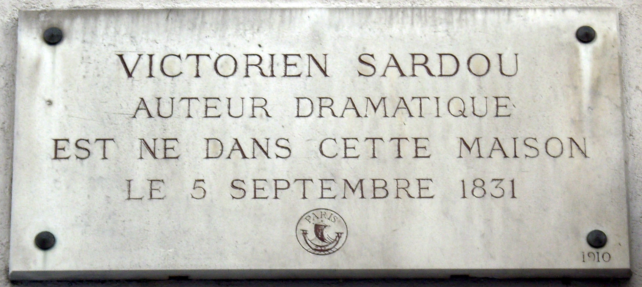 Plaque apposée au n° 16 de la rue Beautreillis, Paris 4e, où naquit l'auteur dramatique Victorien Sardou (1831-1908) le 5 septembre 1831.